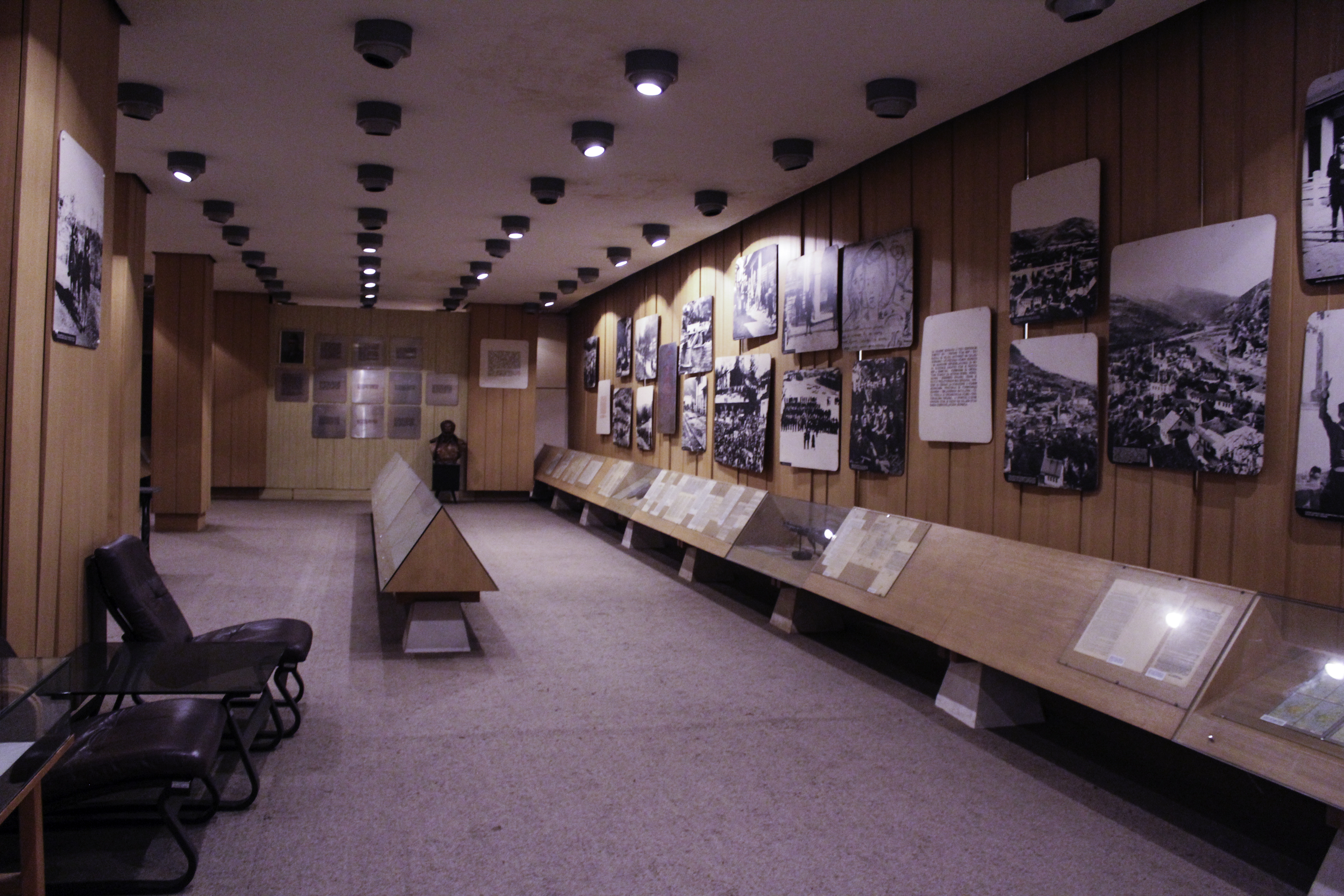 Fočanski period NOB-a - dio postavke u Muzeju Stare Hercegovine u Foči.